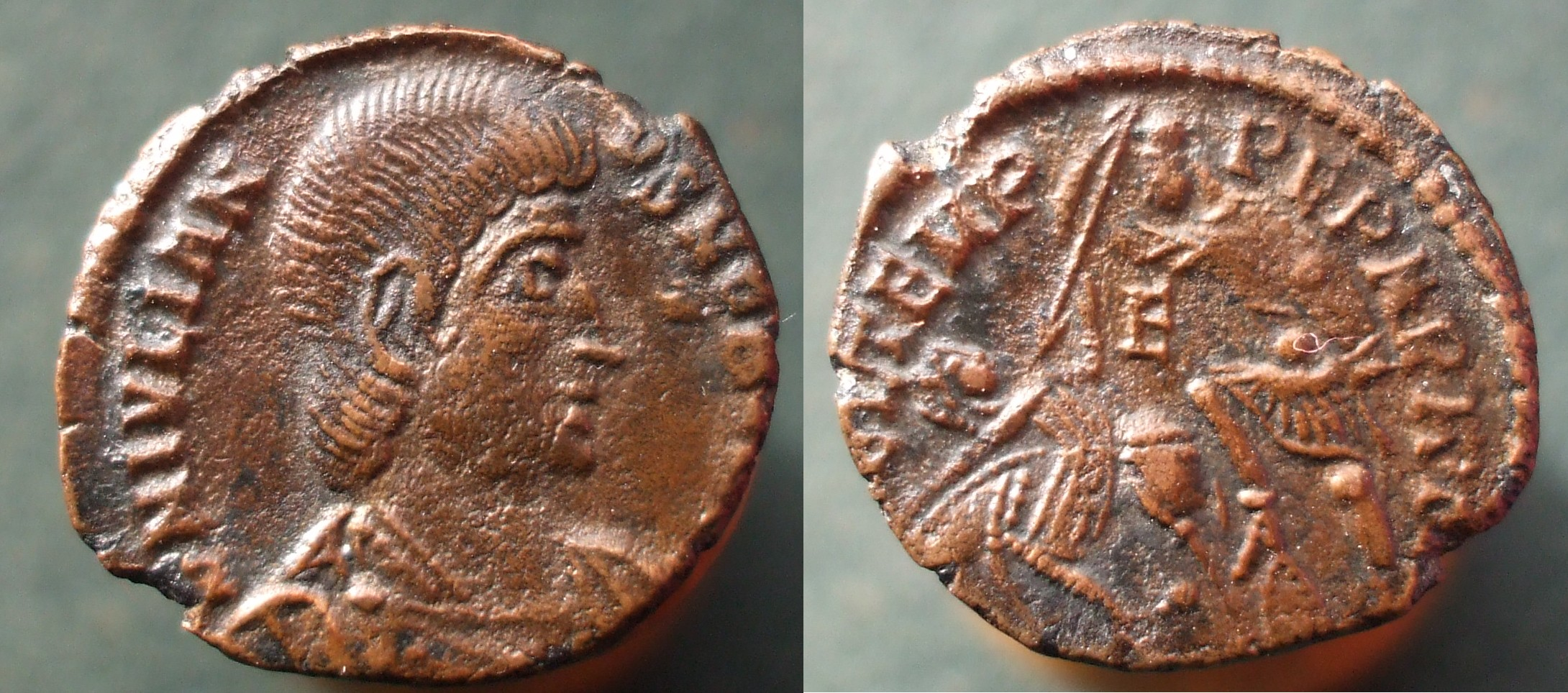 monnaie Julien II Apostat césar